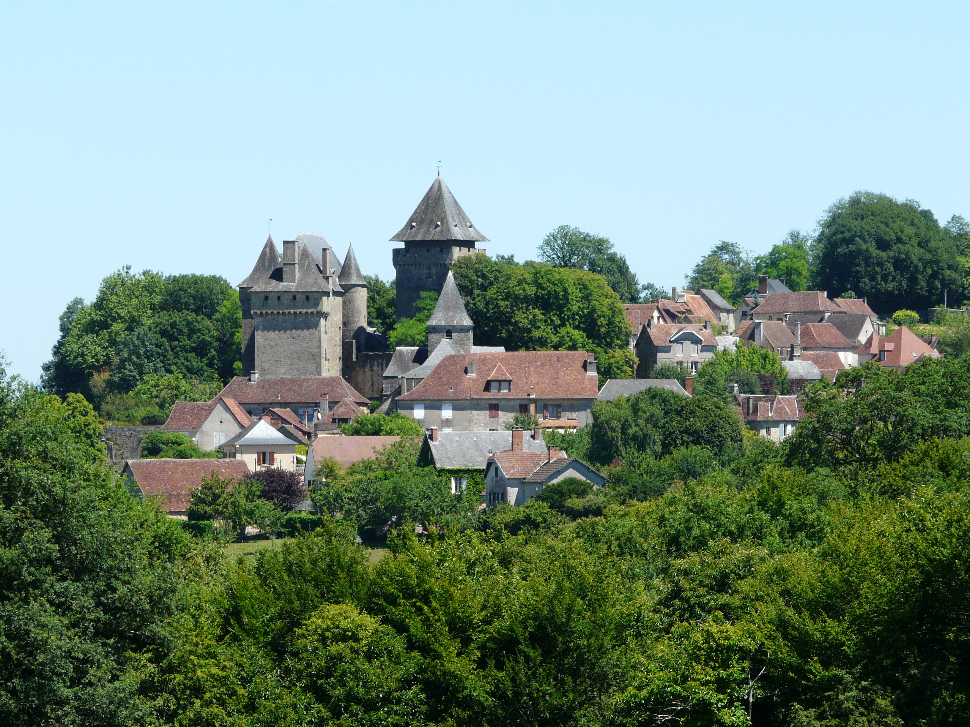 Le village de Badefols-d'Ans, Dordogne, France.